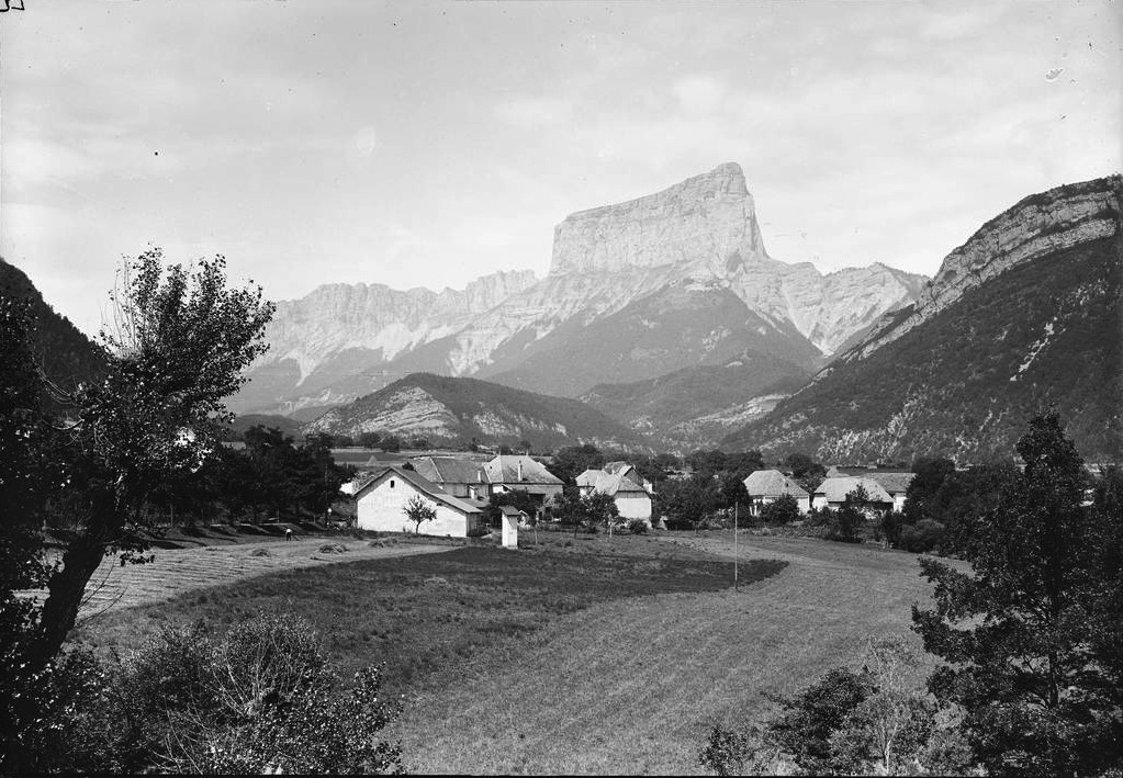 vue générale de Clelles et du Mont Aiguille, Clelles, Isère, France.